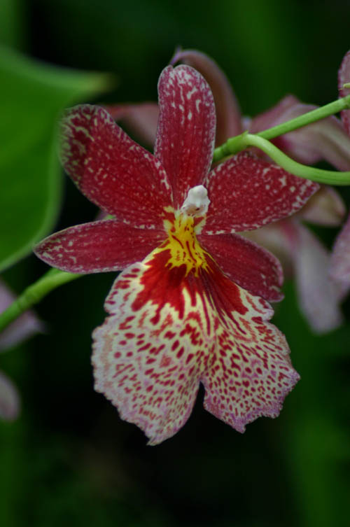 "Pololei Flame"Burrageara